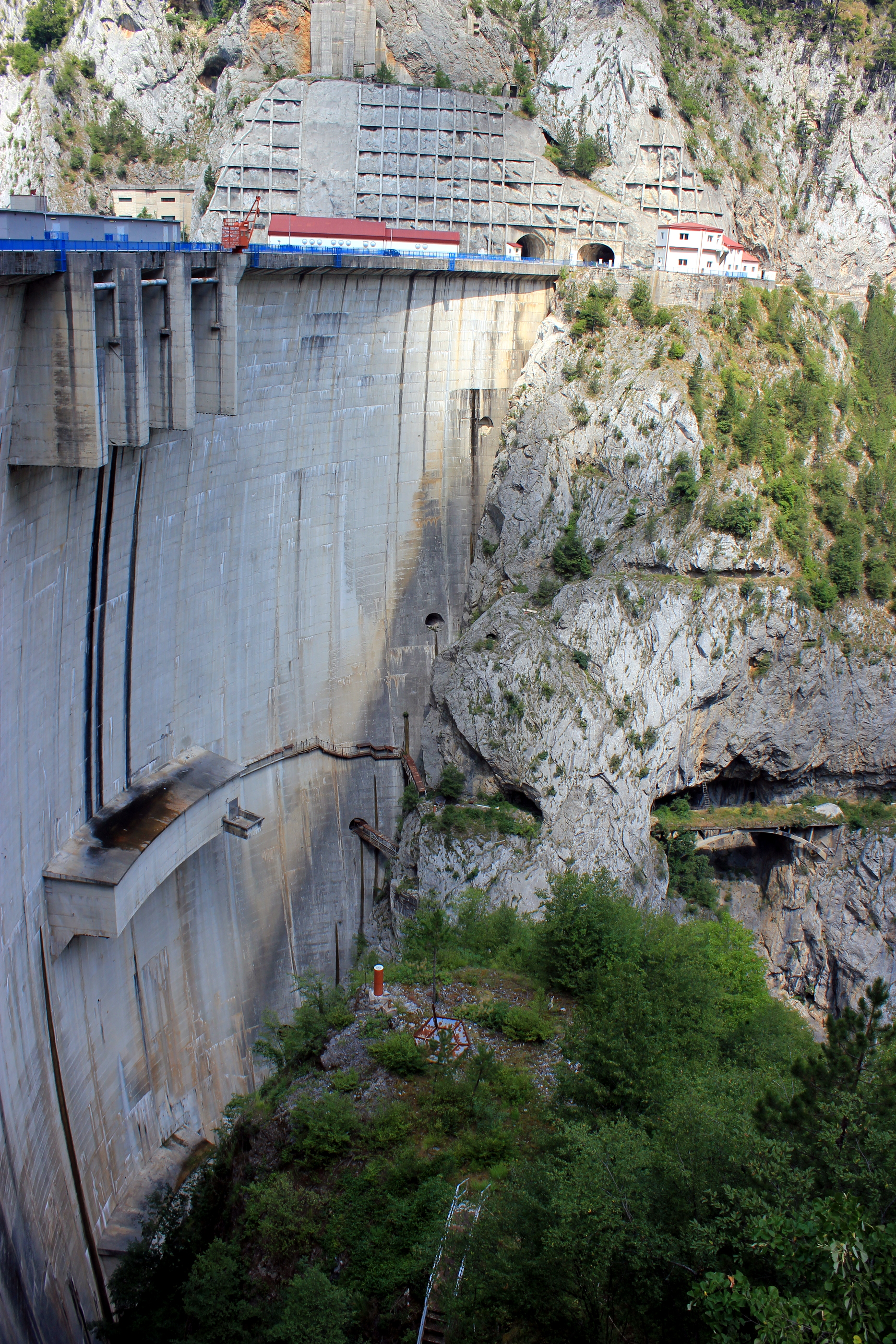 Blick auf den Staudamm des Piva-Stausees bei Plužine, Montenegro.Hornjoserbsce: Rěčna zawěra při rěce Piwa pola Plužine na sewjerozapadźe Čorneje hory.